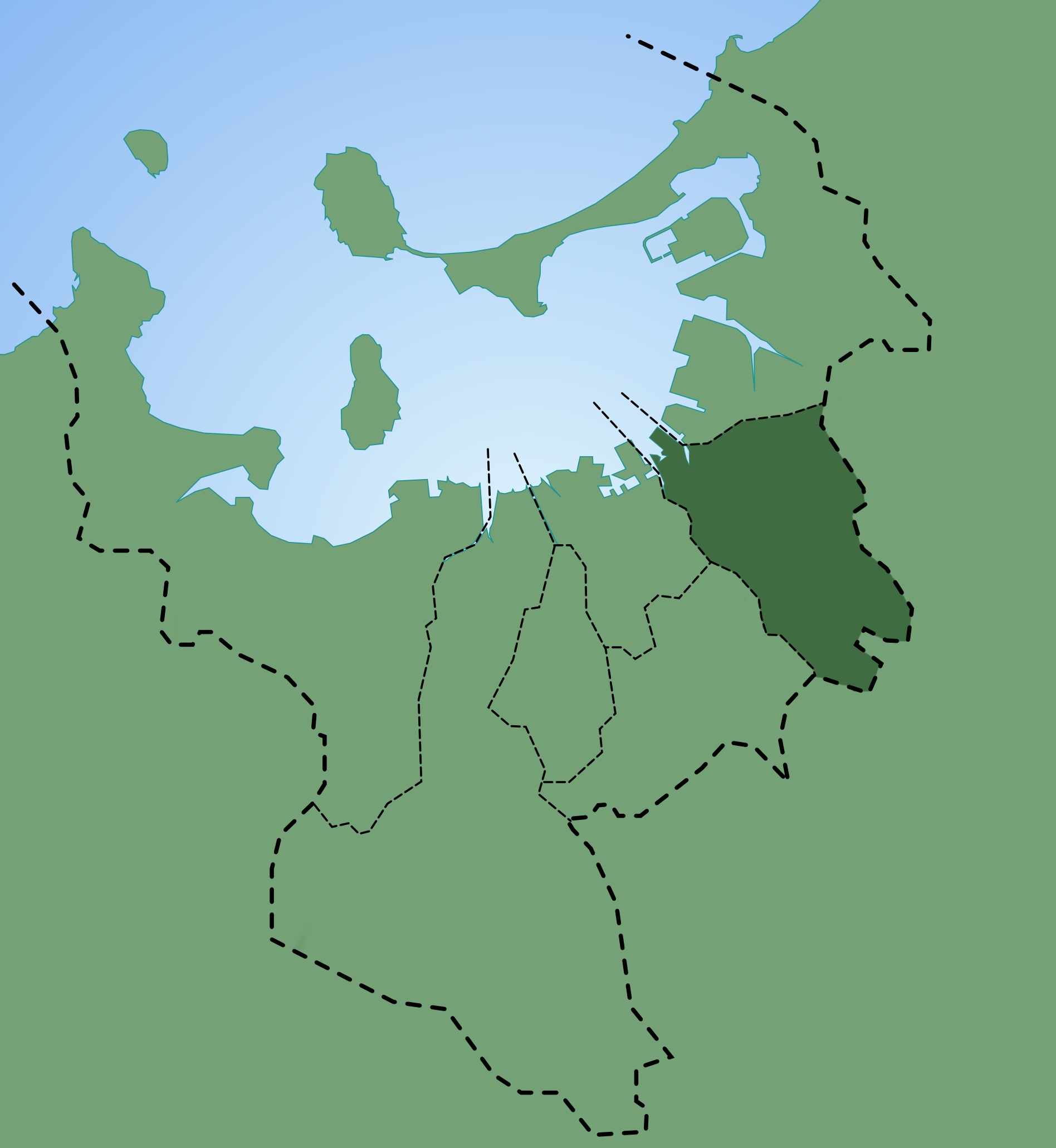 Hakata-ward of Fukuoka, Fukuoka in Japan.